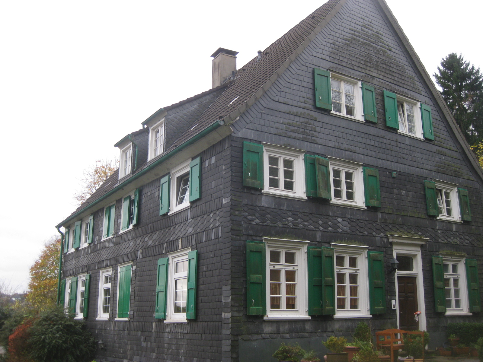 Das Hofeshaus Altenloh, Ennepetal (NRW), Ischebecker Str. 13 This is a photograph of an architectural monument.